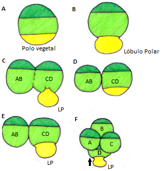 Proceso de formación y reabsorción del lobulo polar en el Escafopodo Dentalium (El esquema se hizo con base en una imagen de 'Developmental Biology' de Scott Gilbert)